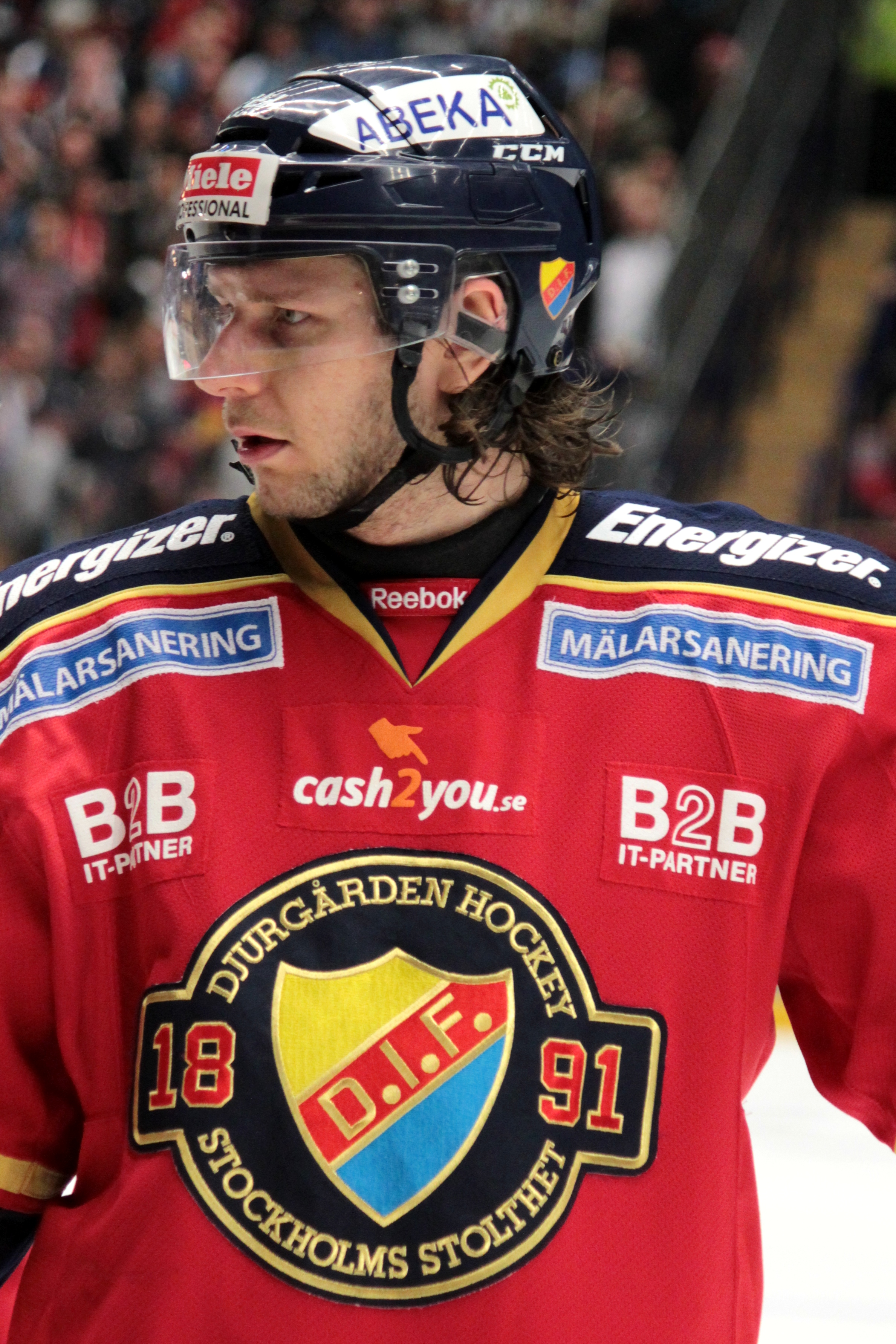 Andreas Holmqvist i kvalmatchen mellan Leksands IF och Djurgårdens IF i Leksand 2012-03-31